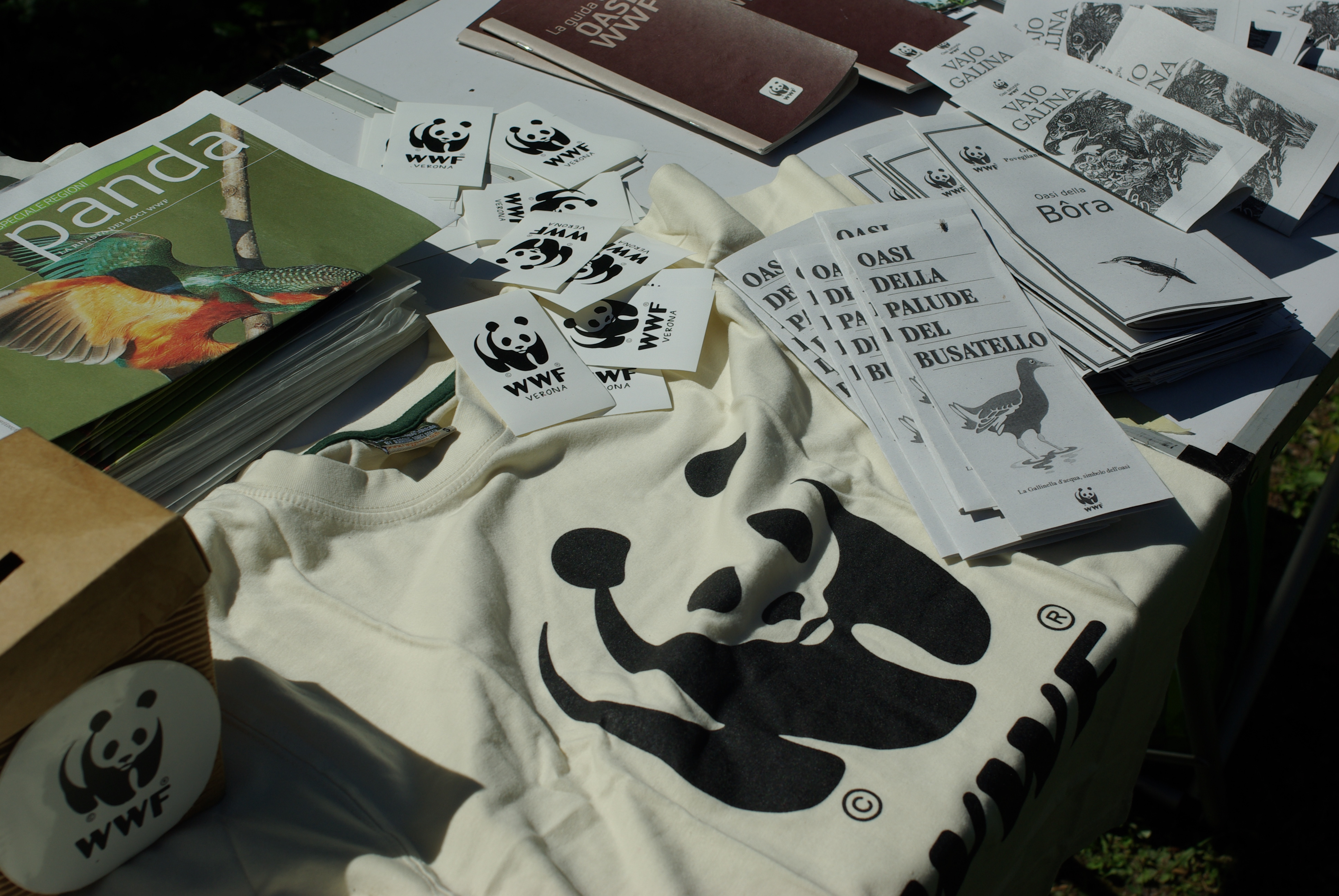 Oasi WWF della Palude del Busatello (Gazzo Veronese VR) Giornata delle Oasi 2012-04-25 photo WWF Verona Paolo Villa